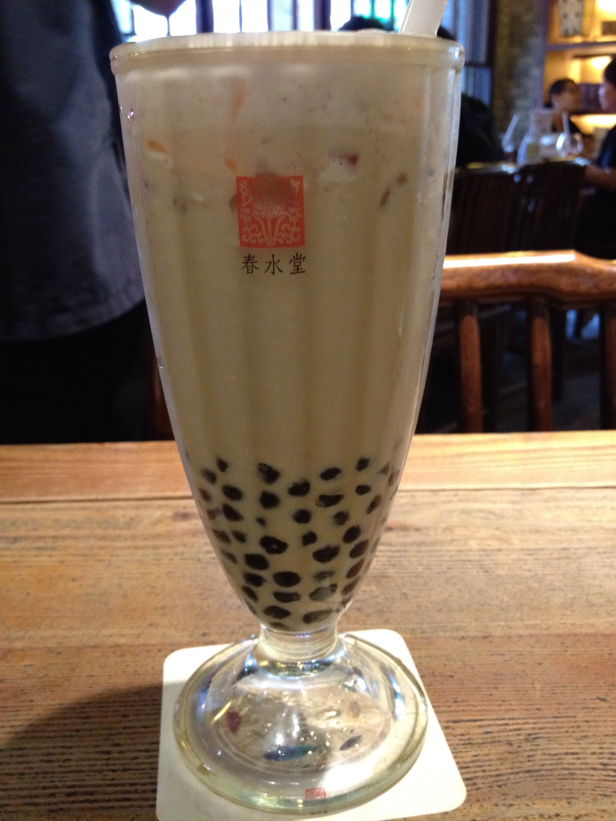 春水堂本店的珍珠奶茶。